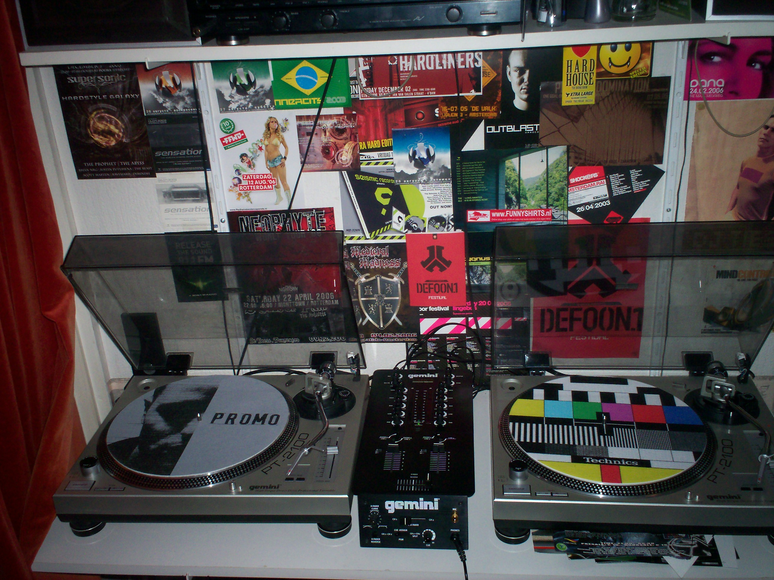 2 moderne draaitafels en een mengpaneel